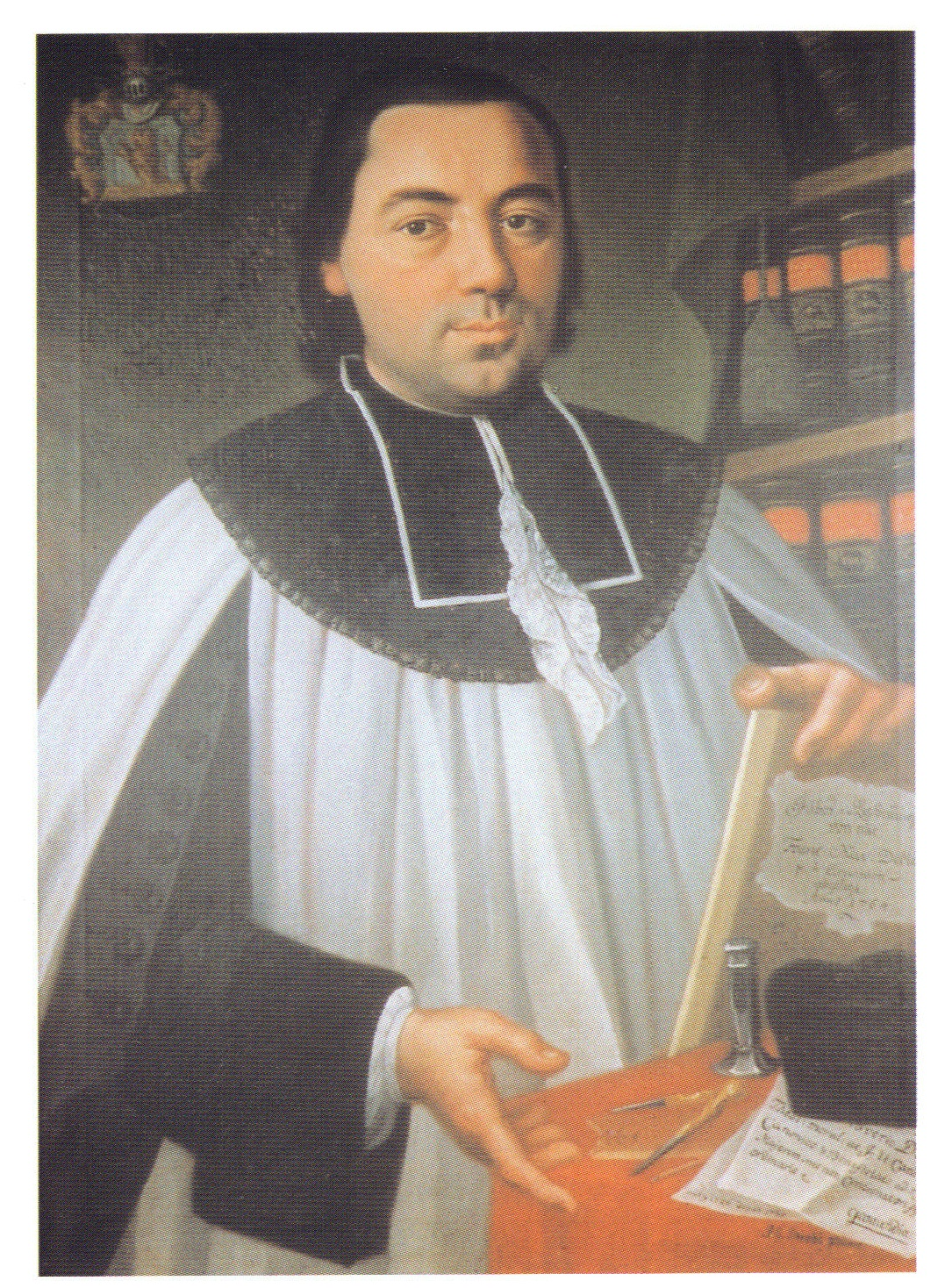 Franz Xaver Debler, Stiftsdekan und Chronist in Schwäbisch Gmünd, Ölgemälde im Münsterpfarrhaus Schwäbisch Gmünd